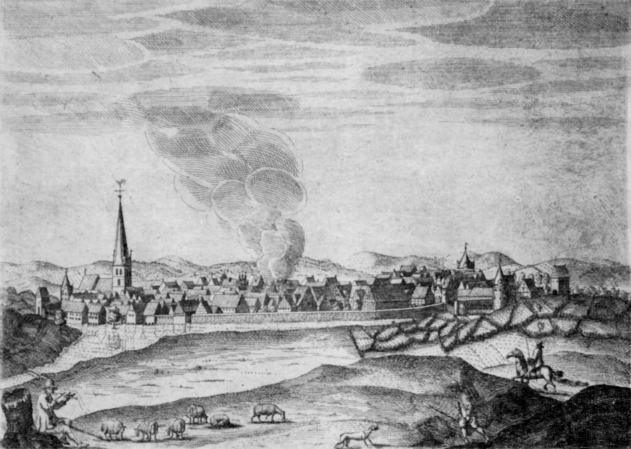 Ansicht der Stadt Salzuflen von Norden, um 1663 (Kupferstich von Elias van Lennep)